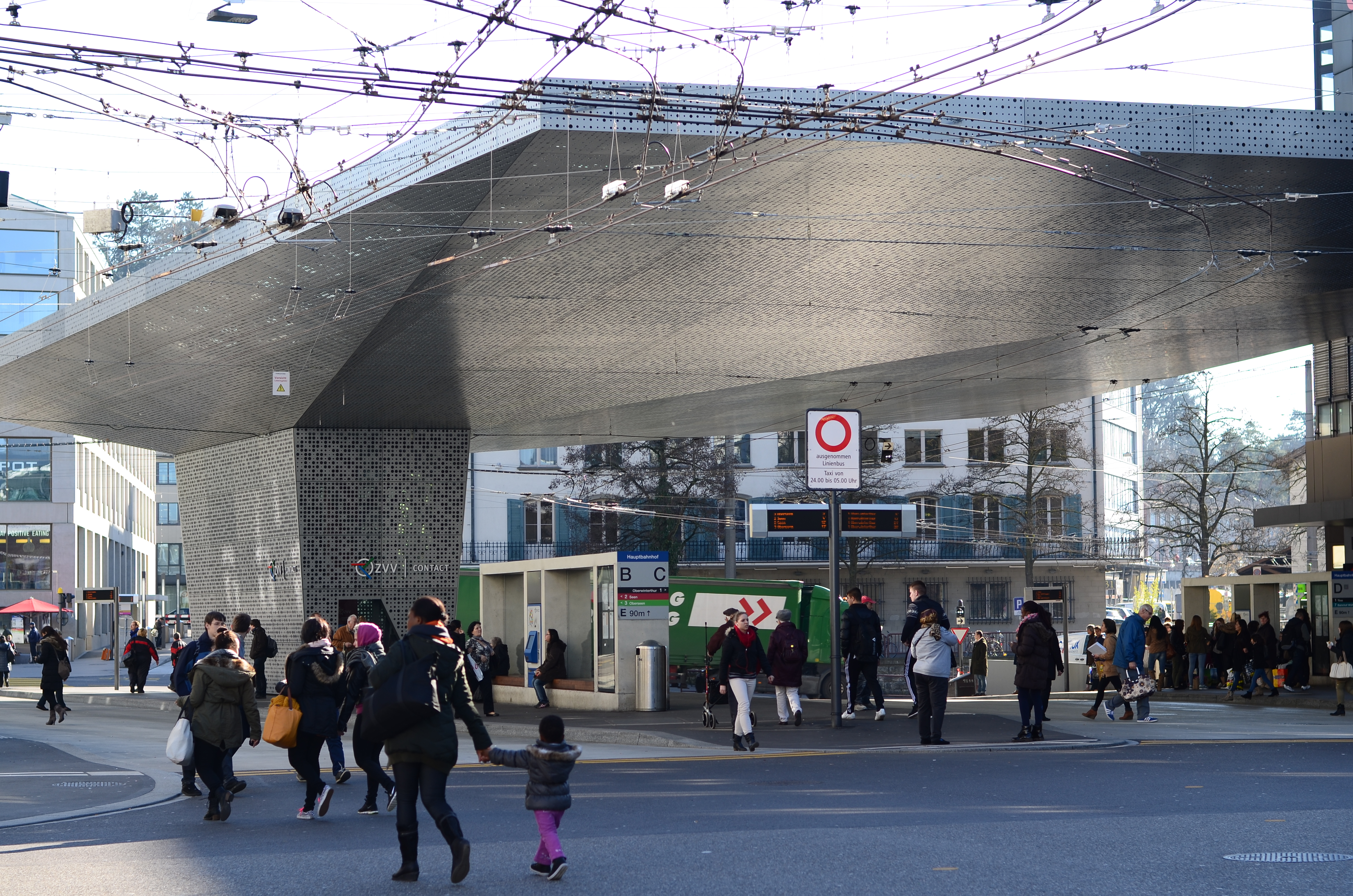 Busterminal, Hauptbahnhofin Winterthur